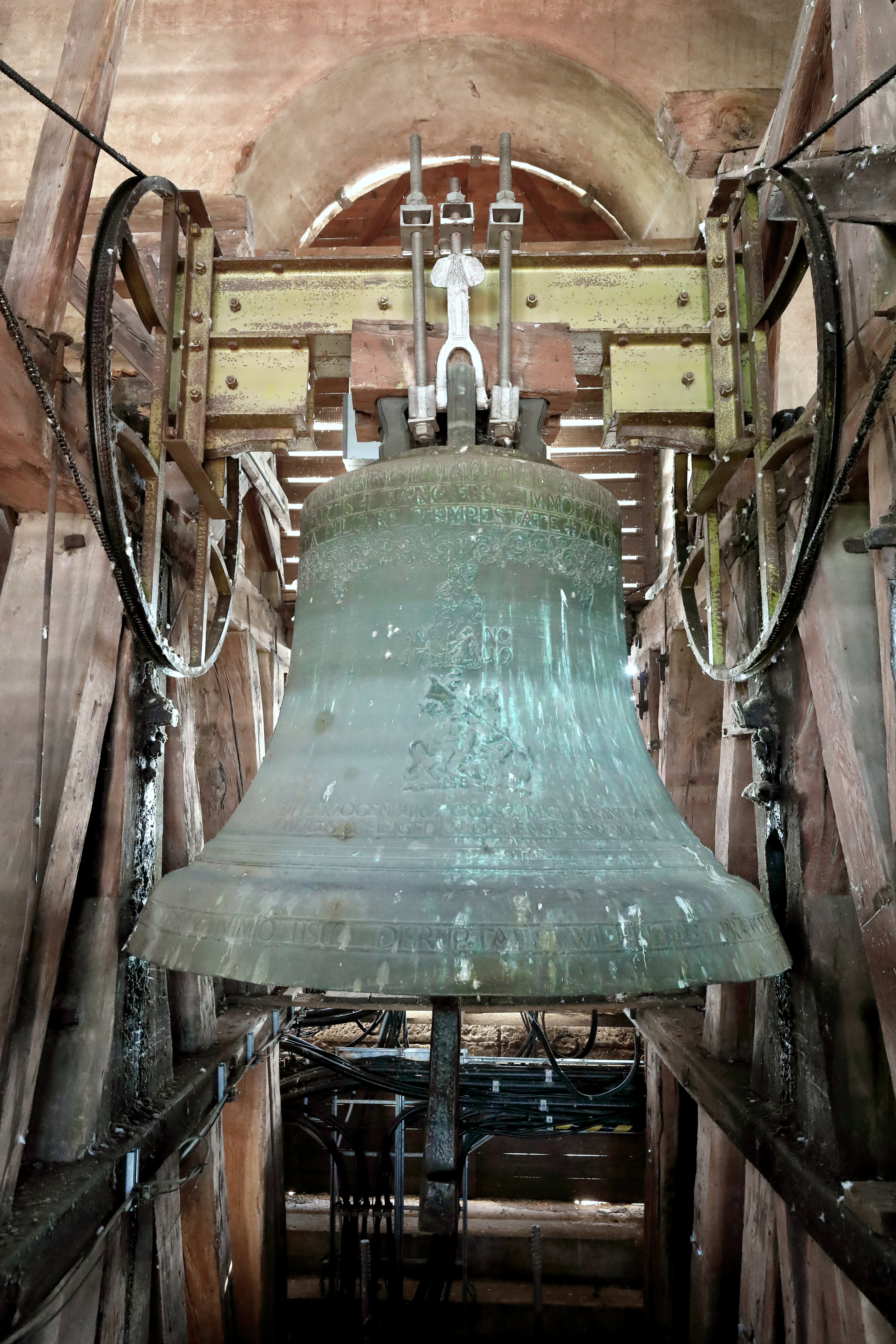 Die größte Glocke der Stiftskirche des Augustiner-Chorherrenstiftes in der niederösterreichischen Stadt Herzogenburg.Die als „Pummerin“ bezeichnete Glocke wurde 1719 von der Glockengießerei Scheichel gegossen. Sie hat einen Durchmesser von 188 cm, ein Gewicht von 3.864 kg und der Schlagton ist a0-4. Die Glockenstubenbegehung erfolgte im Zuge der Aktion „Lange Nacht der Kirchen“.